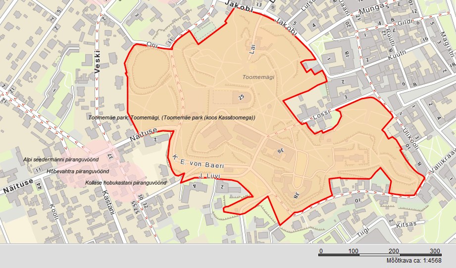 Toomemäe pargi kaart. Põhineb Maa-ameti kaardil.